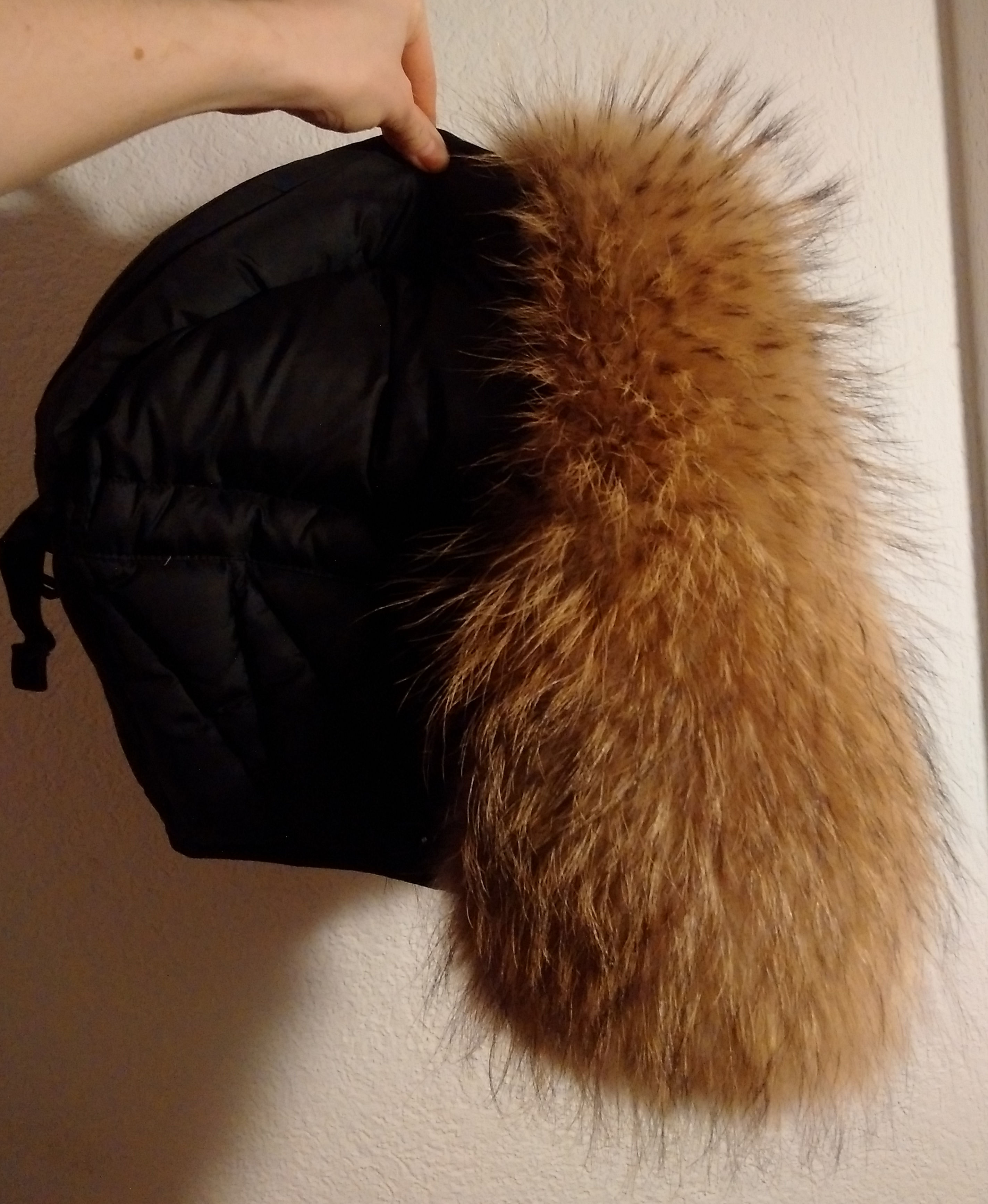 Kapuze mit Verbrämung aus deutschem Seefuchsfell (Wildfang), 2016. Ausführung: Marie-Louise Staempfli.